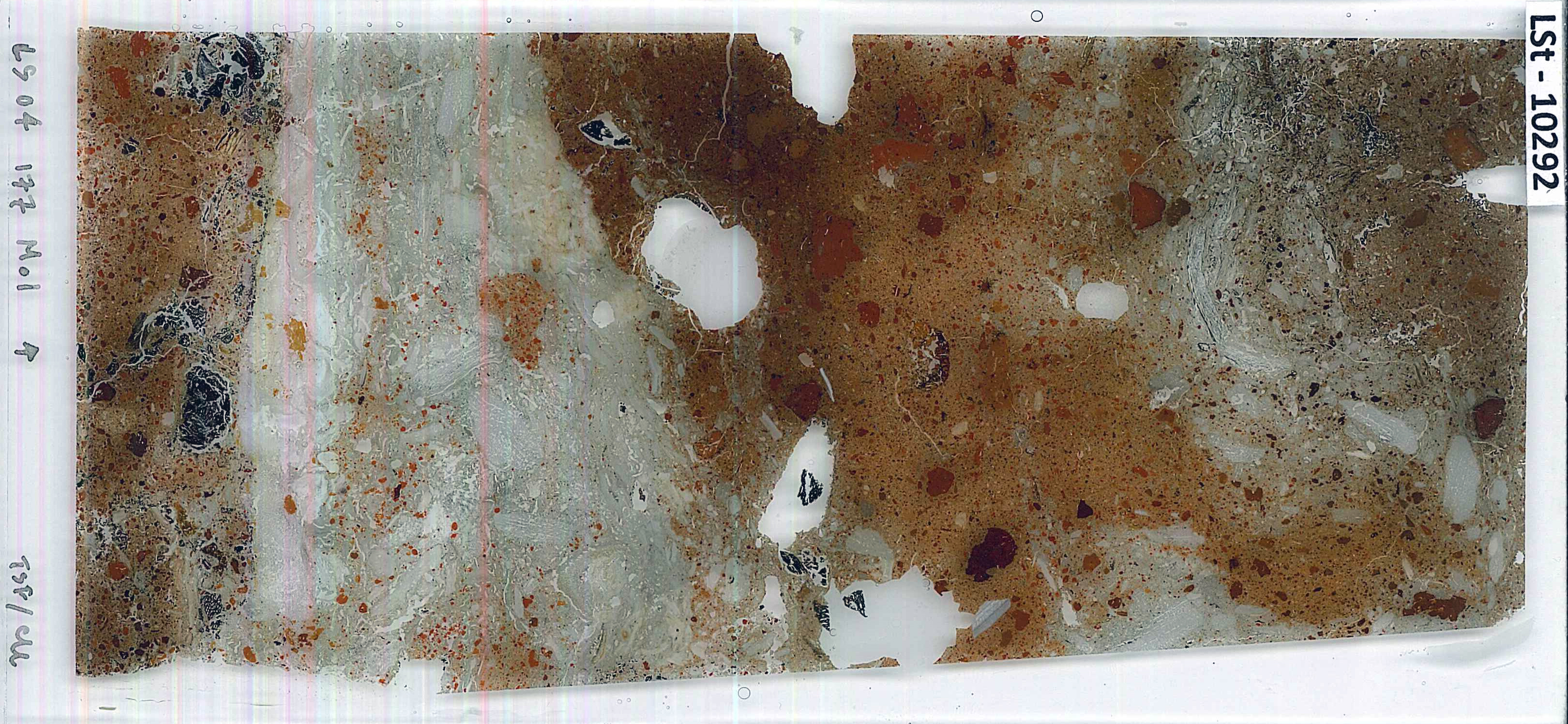 A micromorfologia é uma técnica na qual uma bloco de sedimento é impregnado com resina para que seja possível a produção de uma lâmina delgada. A lâmina delgada constituí um testemunho da composição do sítio e fornece informações importantes sobre processos de formação a partir de sua observação ao microscópia. Essa imagem mostra uma lâmina delgada do sítio arqueológico Lapa do Santo que recebeu número de identificação 'LSt-10292'. Foi coletada de uma estrutura de combustão exposta como perfil entre duas unidades M's. O topo da amostra foi referenciado pela estação total com as seguintes coordenadas: x:1,247; y: 4,018; z=0,223 e a amostra recebeu o PN A0177. Coleta e produção: Manuel Arroyo. Financiamento: Fundação de Amparo a Pesquisa do Estado de São Paulo. Digitalização: André Strauss.